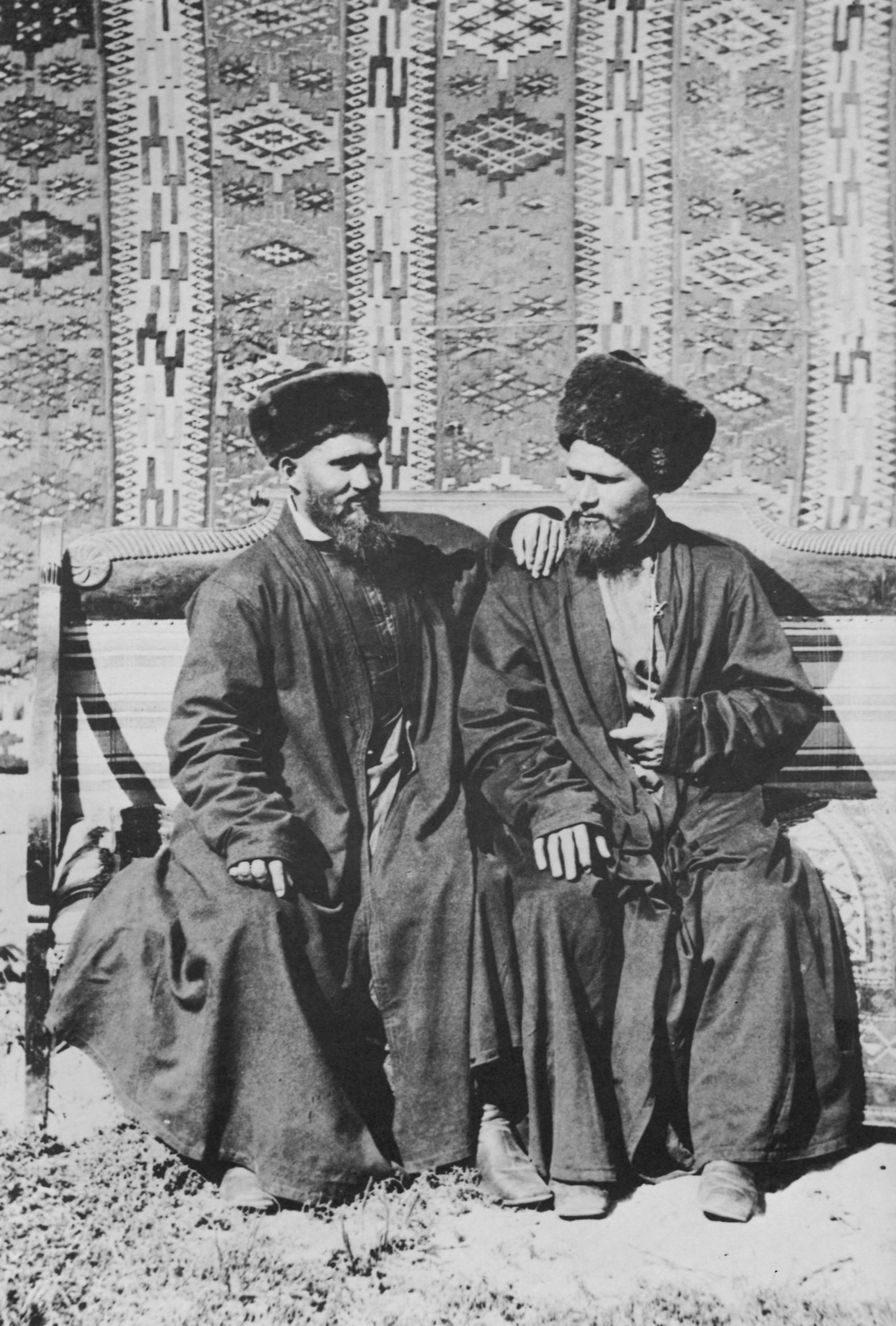 Russischer Photograph um 1885: Tataren aus Kasan